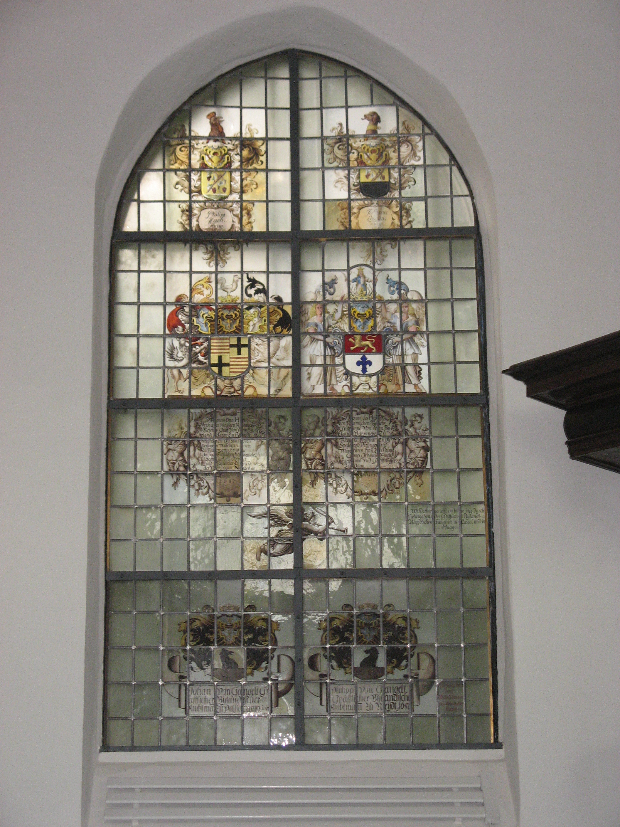 Wappenfester in der Kirchertener Hauskirche, linke Seite